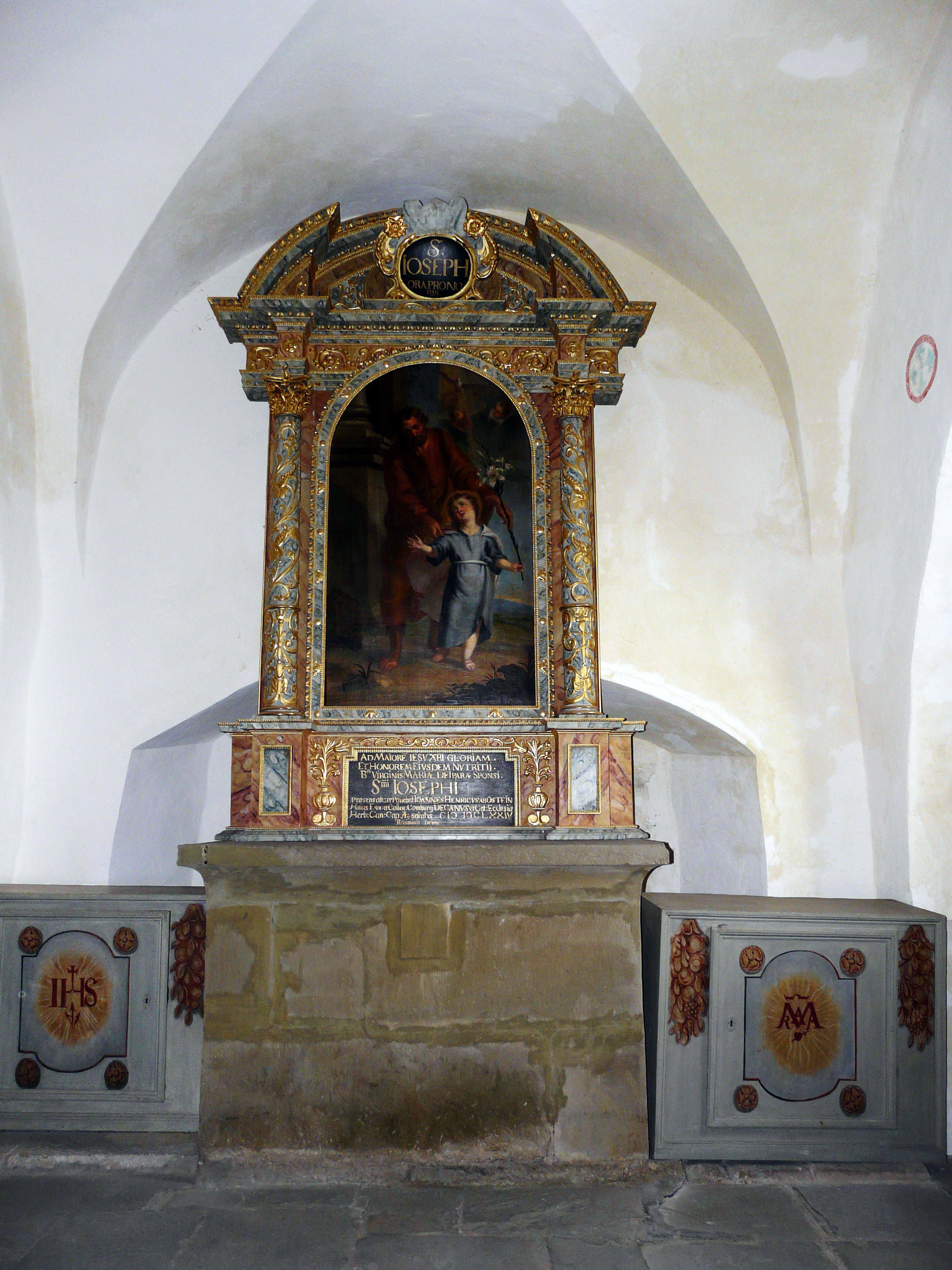 Капелла Св. Иосифа